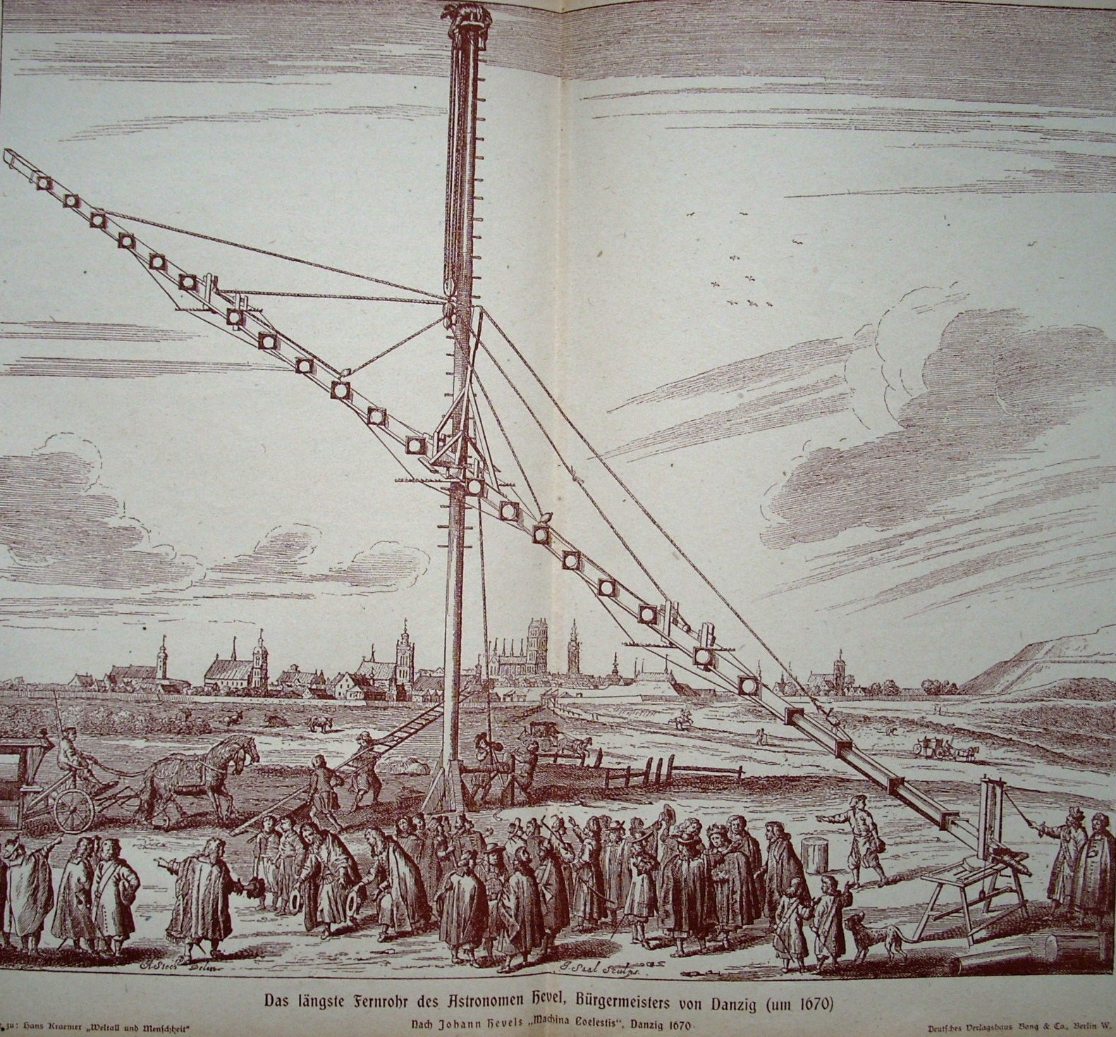 Hevels längstes Fernrohr, Danzig 1670